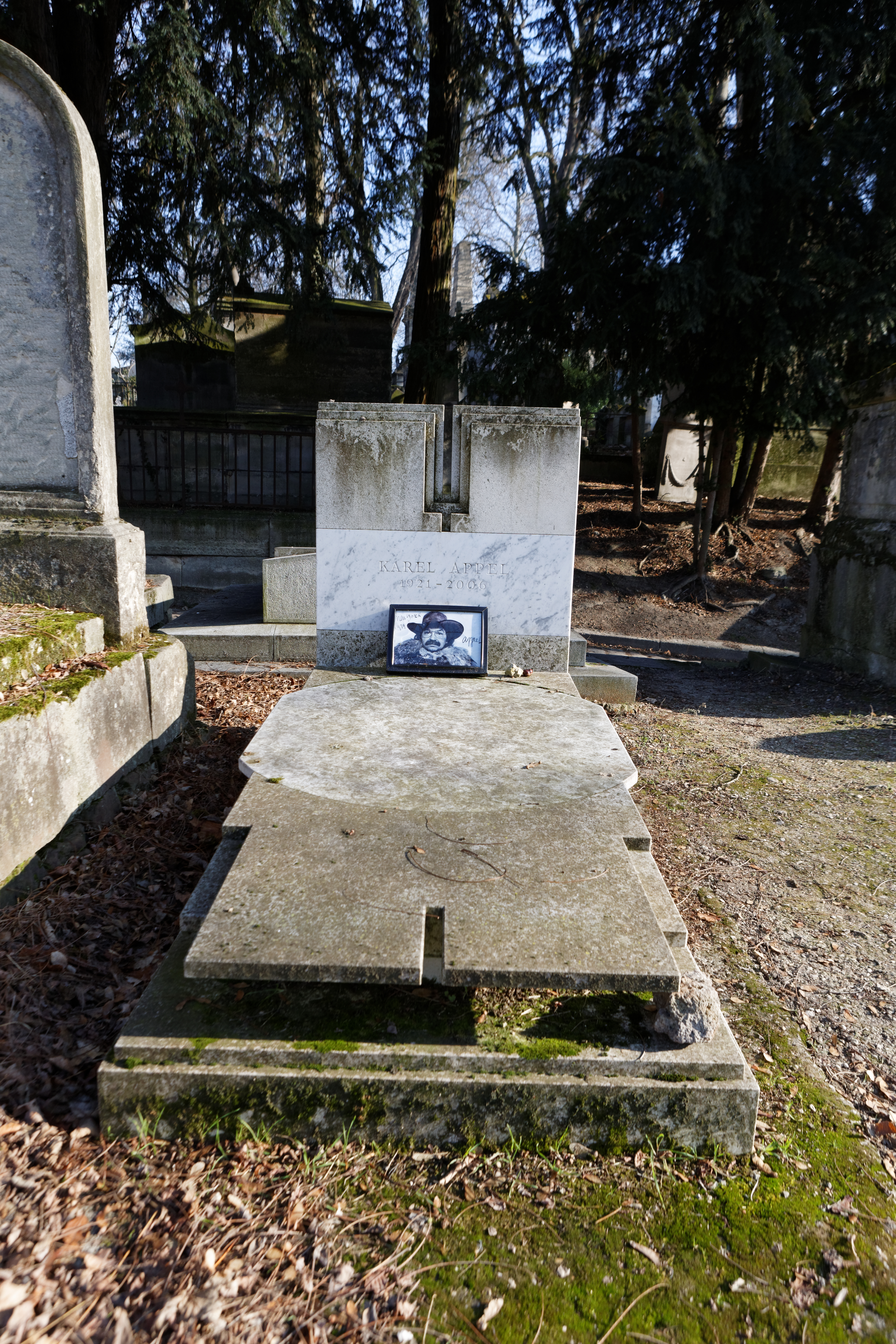 Sépulture de Karel Appel (1921-2006), peintre et sculpteur néerlandais, cofondateur du groupe CoBrA.